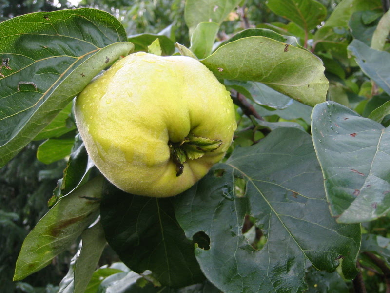 Quittenfrucht am Baum